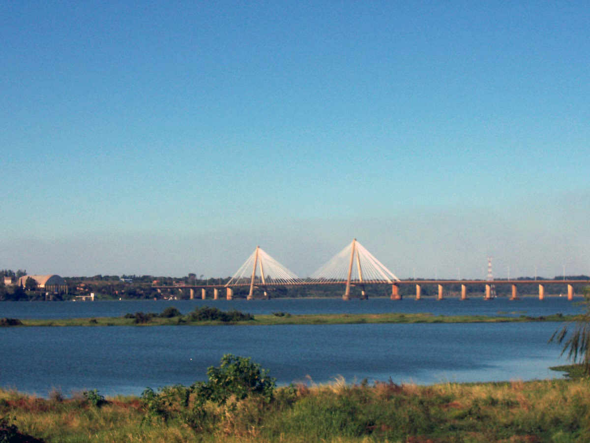 El puente San Roque González de Santa Cruz, que comunica a la ciudad de Posadas (Argentina) con la de Encarnación (Paraguay).